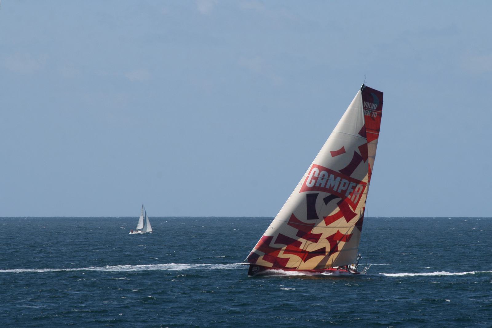 Camper durant la Volvo Ocean Race venant de Lorient allant vers les coureaux de Belle-Ile